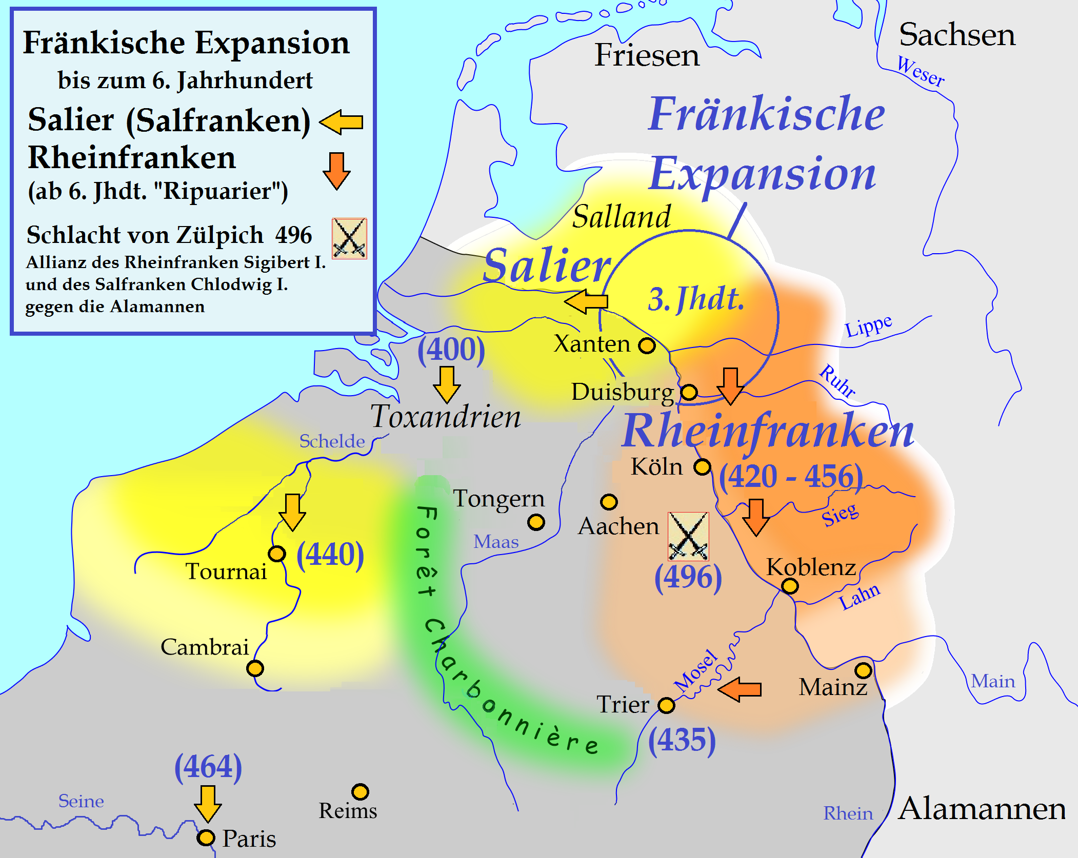 Salfränkische Expansion nach Toxandrien – Rheinfränkische Expansion zum Mittelrhein